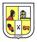 Escudo del municipio sonorense.